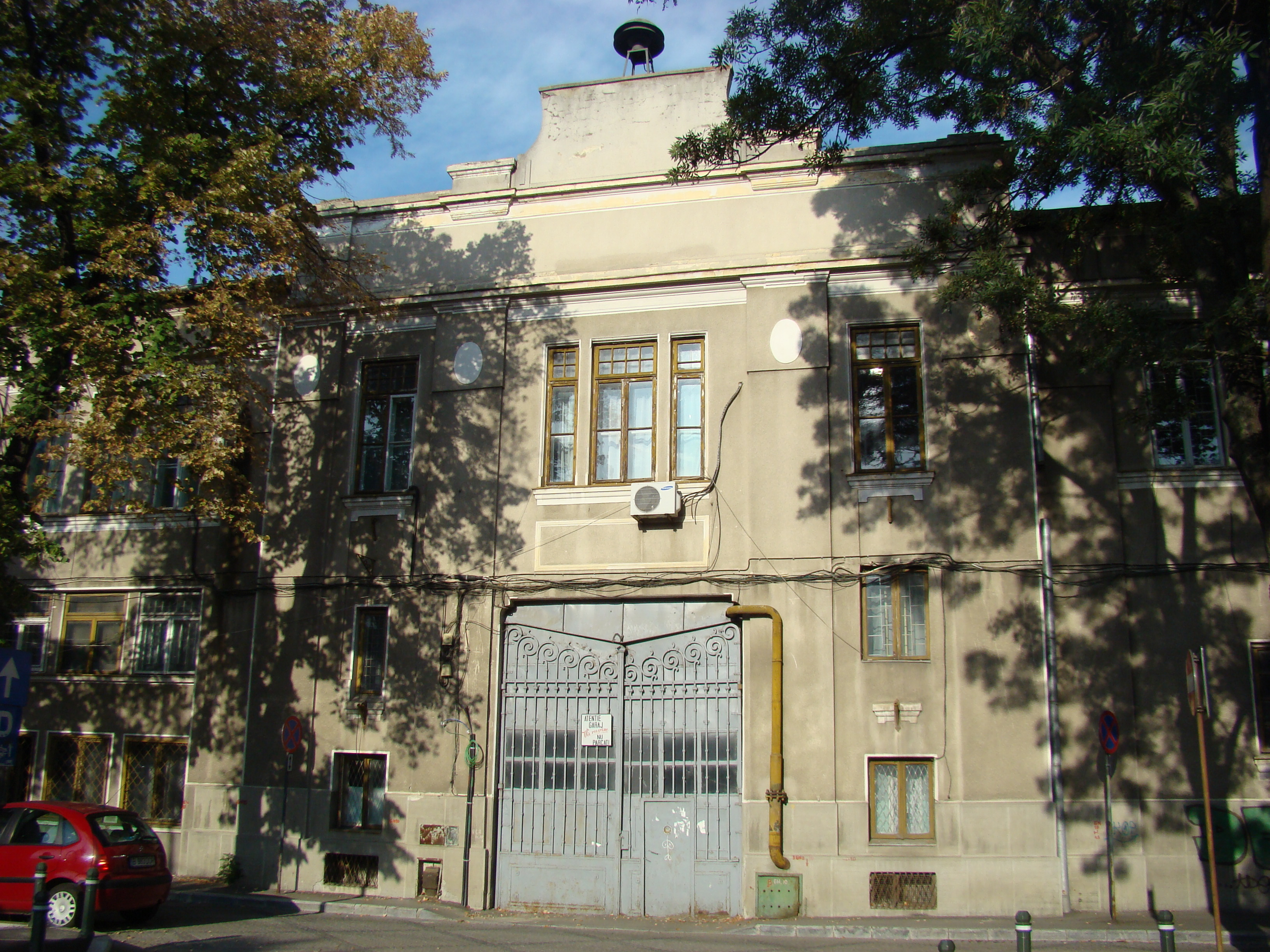 Clădire monument istoric, Bd.Aviatorilor, nr. 16 (Fostul garaj regal)